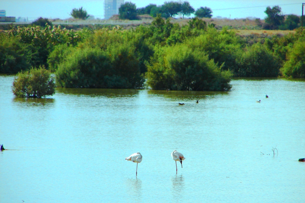 a@a oroklini lake (λίμνη ορόκλινης) oroklini larnaca cy